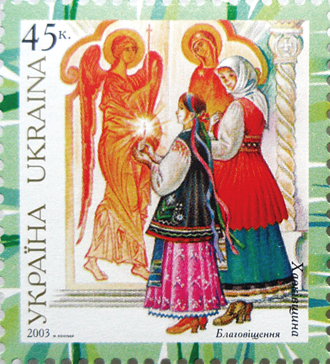 Благовещенье, Харьковщина. Марка Украины, 2003